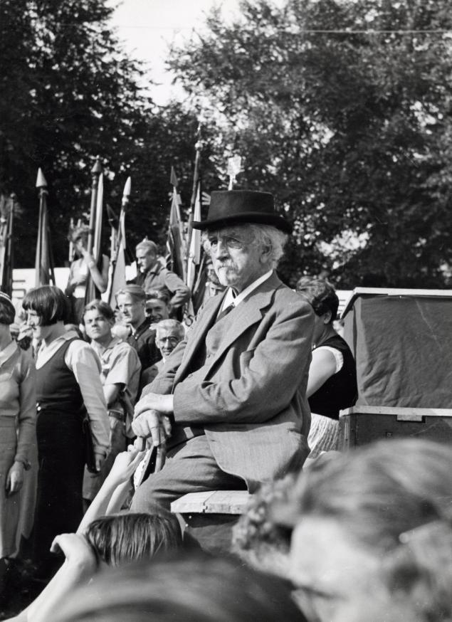 Florentius Marinus Wibaut (1859-1936) zit met hoed op en driedelig pak aan, als toeschouwer op het ijsclubterrein. Het is zomer en er is een S.D.A.P. jeugdbetoging met leden van de Vakjeugdbond, De Blauwe Jeugd , de Sportbond en het AJC te Amsterdam, Nederland 17 september 1933. Dit zou heel goed de S.D.A.P. jeugdbetoging kunnen zijn geweest met leden van de Vakjeugdbond, De Blauwe Jeugd, de Sportbond en de A.J.C. welke gehouden werd op 17 september.